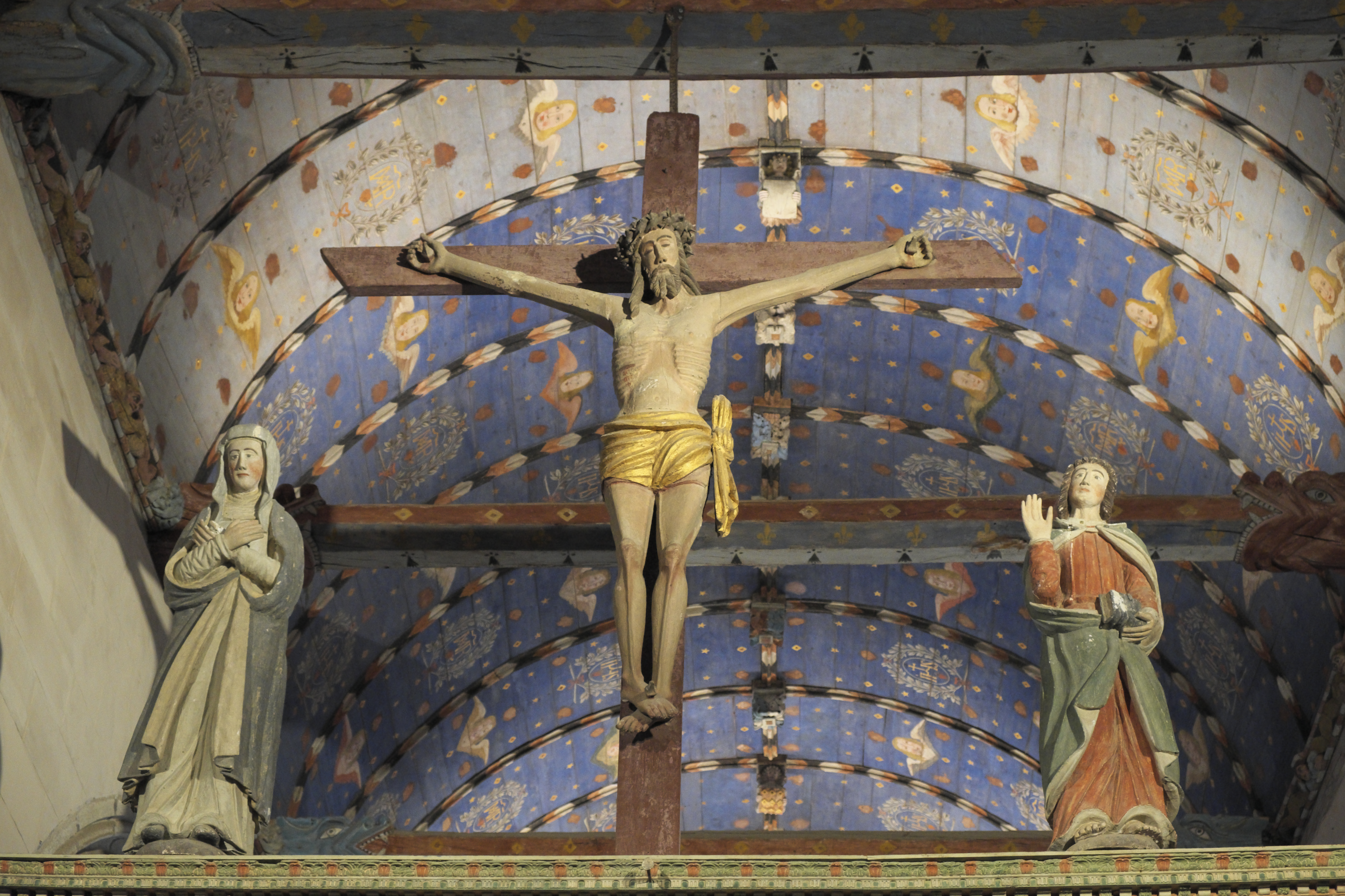 Katholische Pfarrkirche Saint-Yves in La Roche-Maurice im Département Finistère (Region Bretagne/Frankreich), Kreuzigungsgruppe